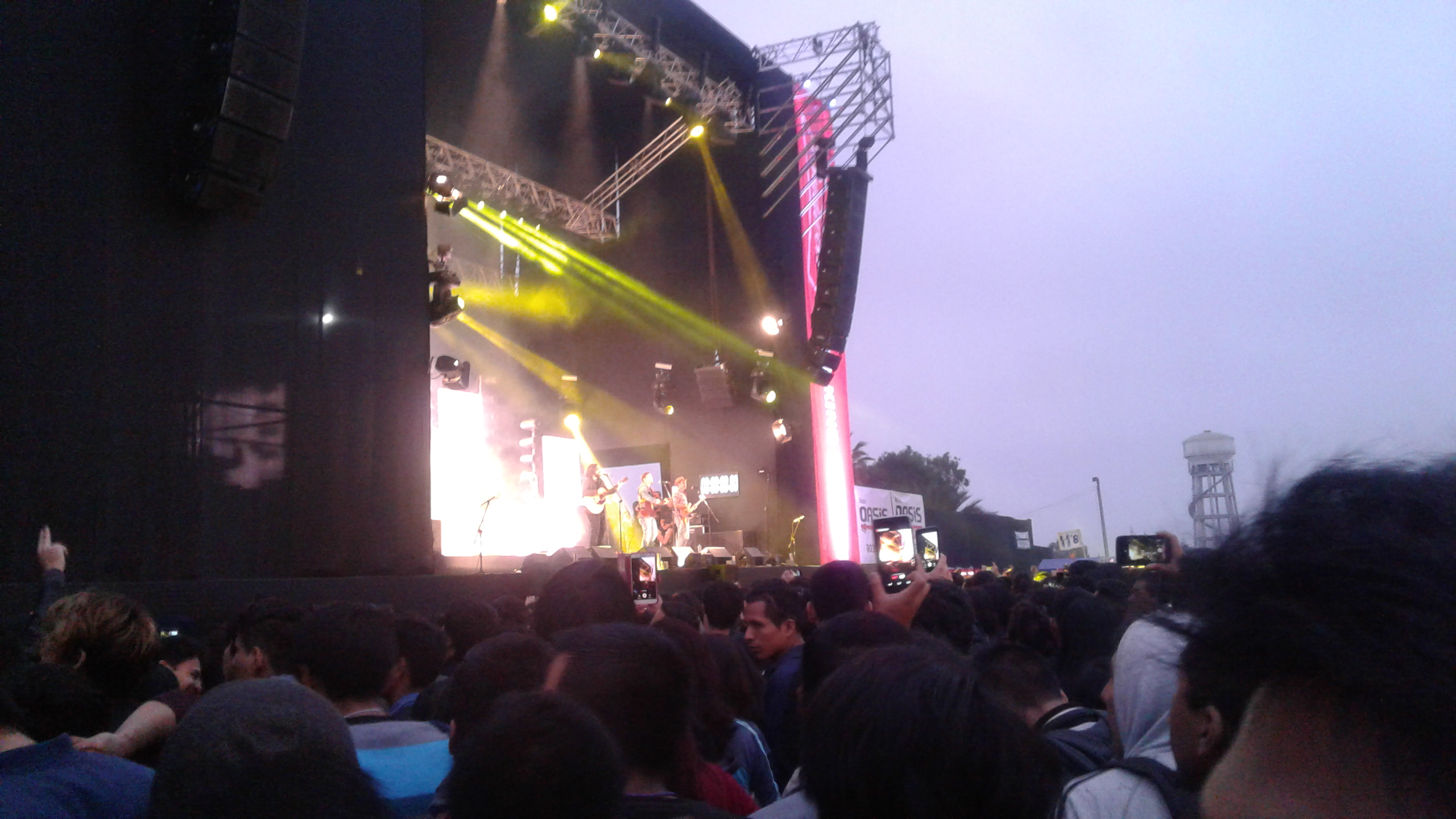 We The Lion en 2018.